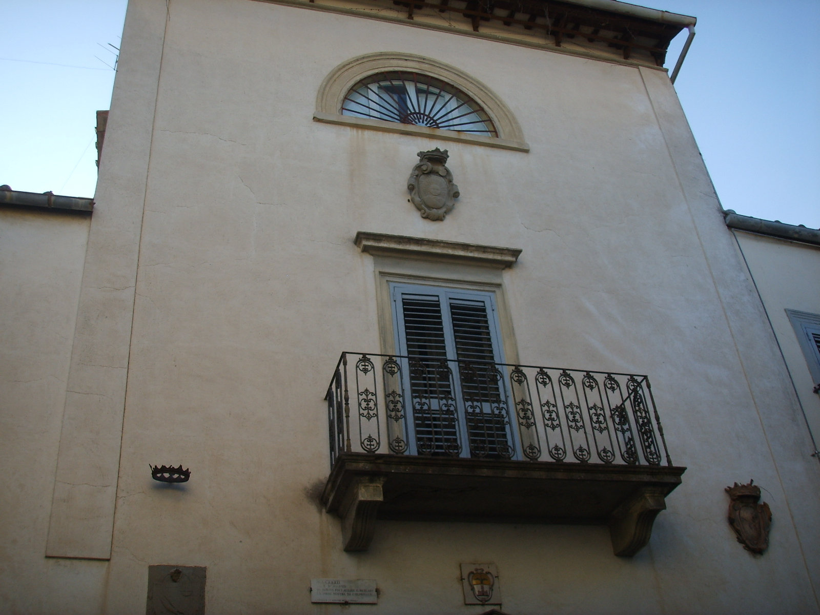 Villa villoresi di sesto, torretta